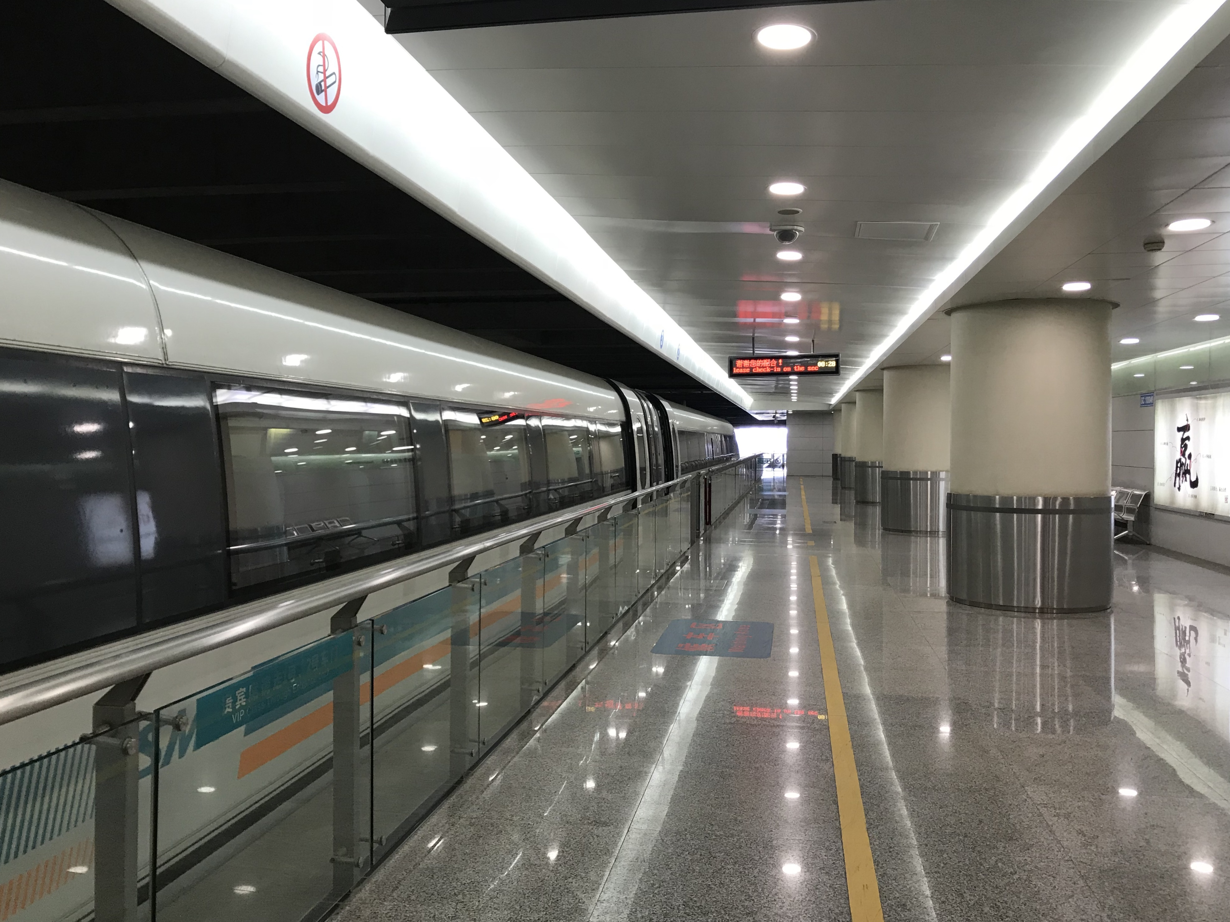 浦東国際空港駅(上海トランスラピッド)のホーム